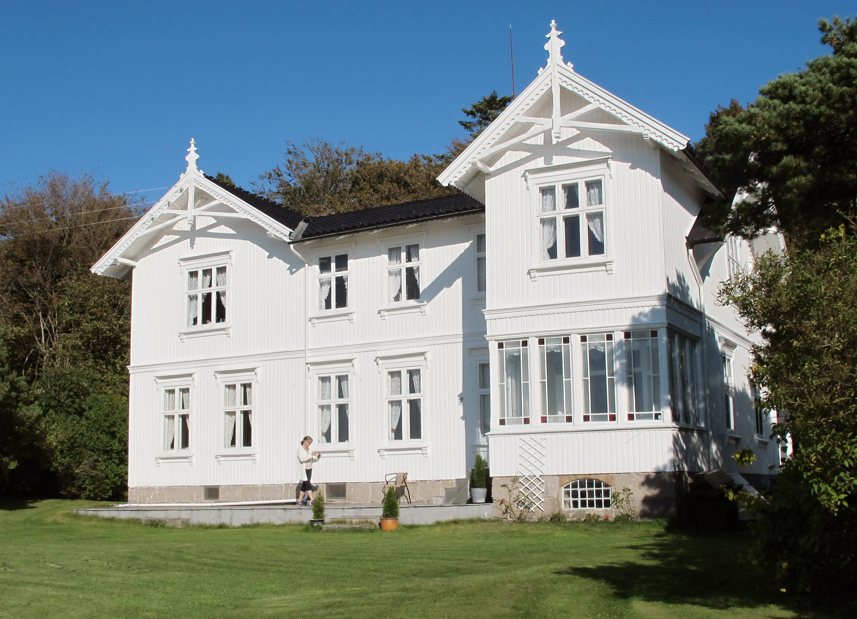 Baldershage pensjonat på Tjøme